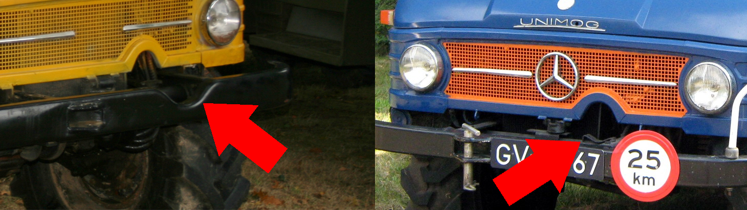 Ausbuchtung an der Frontstoßstange eines Unimog 406: Links: 1974 Rechts: 1963 Basierend auf folgenden Bildern: Bild von davocano Bild von Norbert Schnitzler